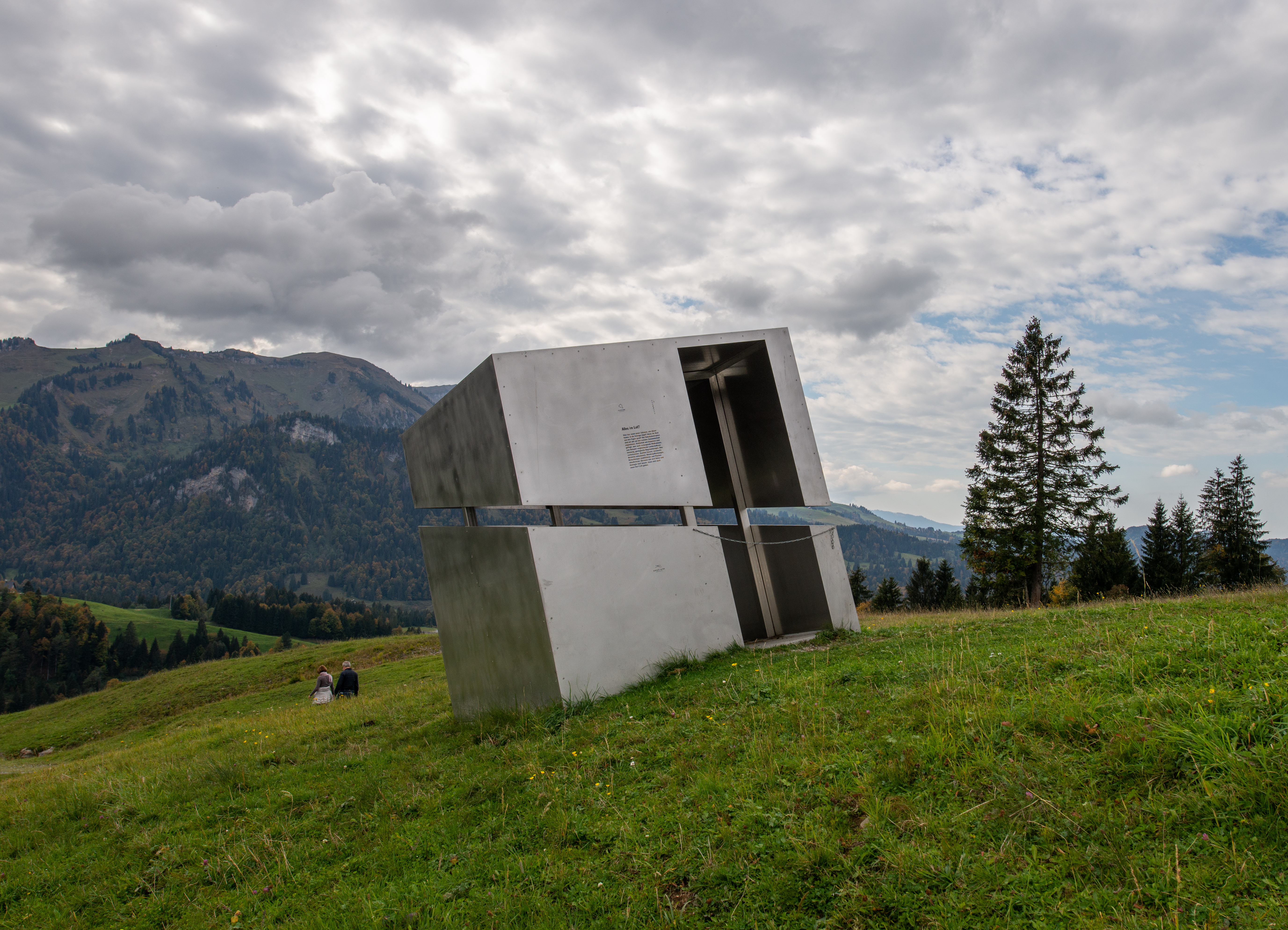 die Georunde Rindberg in Sibratsgfäll. Ausgehend von "Felbers schiefem Haus" wurden acht Objekte in der Hanglandschaft angeordnet, welche das Leben in der Schräge, die Kraft der Natur und die hier besonders notwendige Akzeptanz der steten Veränderung erfahrbar machen.